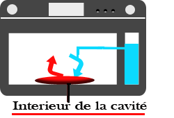 Four vapeur ou combiné vapeur avec technologie, générateur interne. Consiste en une coupole dans la sole du four qui contient l'eau qui produit la vapeur